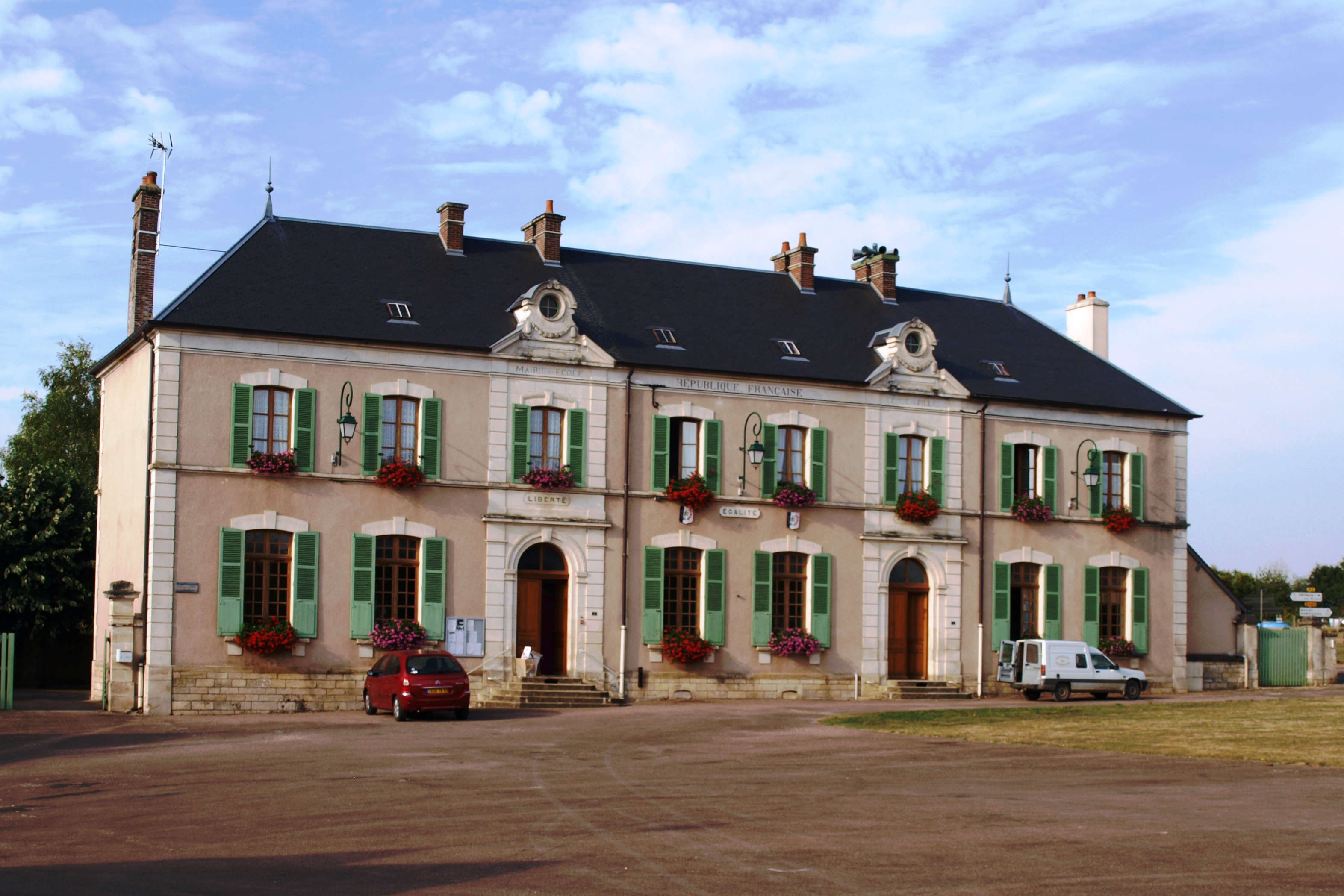 Sainpuits (Yonne) - La mairie